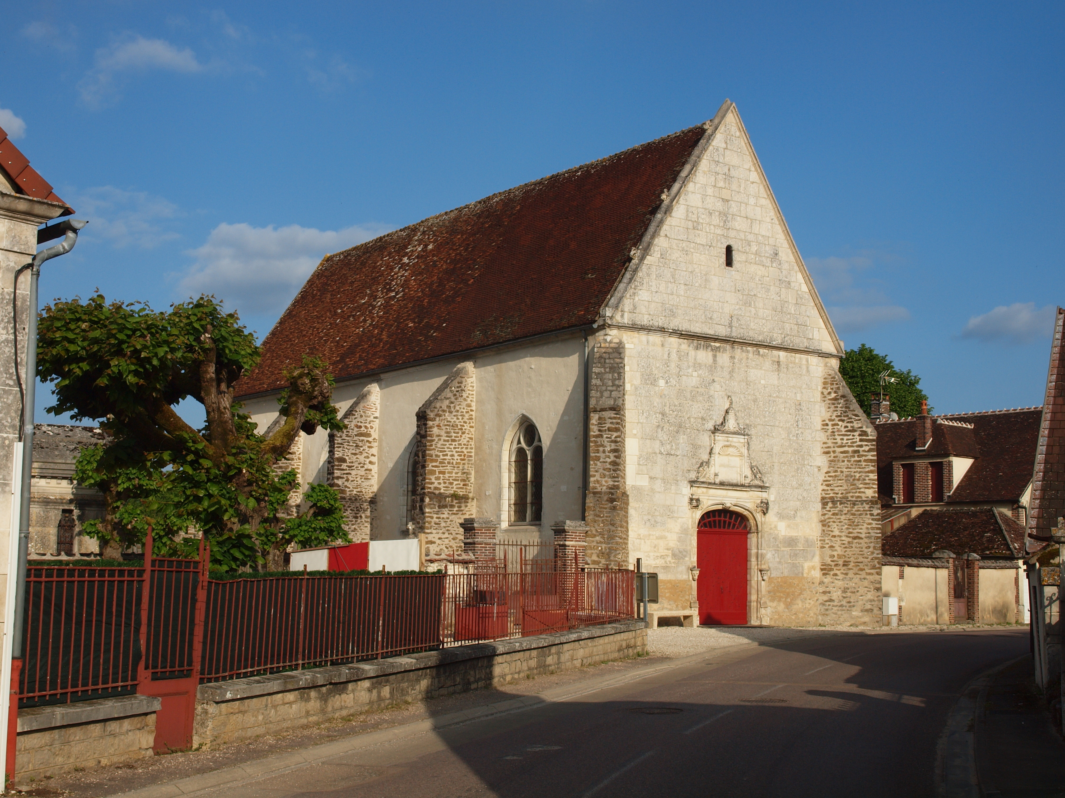 Bonnard (Yonne, France)